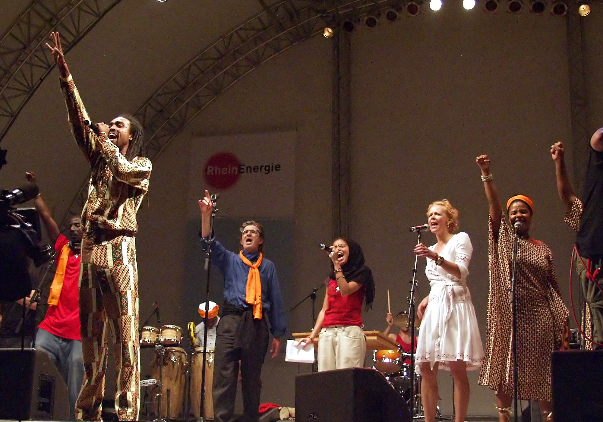 Katja Riemann zusammen mit den Brothers Keepers auf dem Deutschen Evangelischen Kirchentag 2007 während der Veranstaltung „Die Macht der Würde: Globalisierung neu denken. Ruf an den G8-Gipfel in Heiligendamm“.